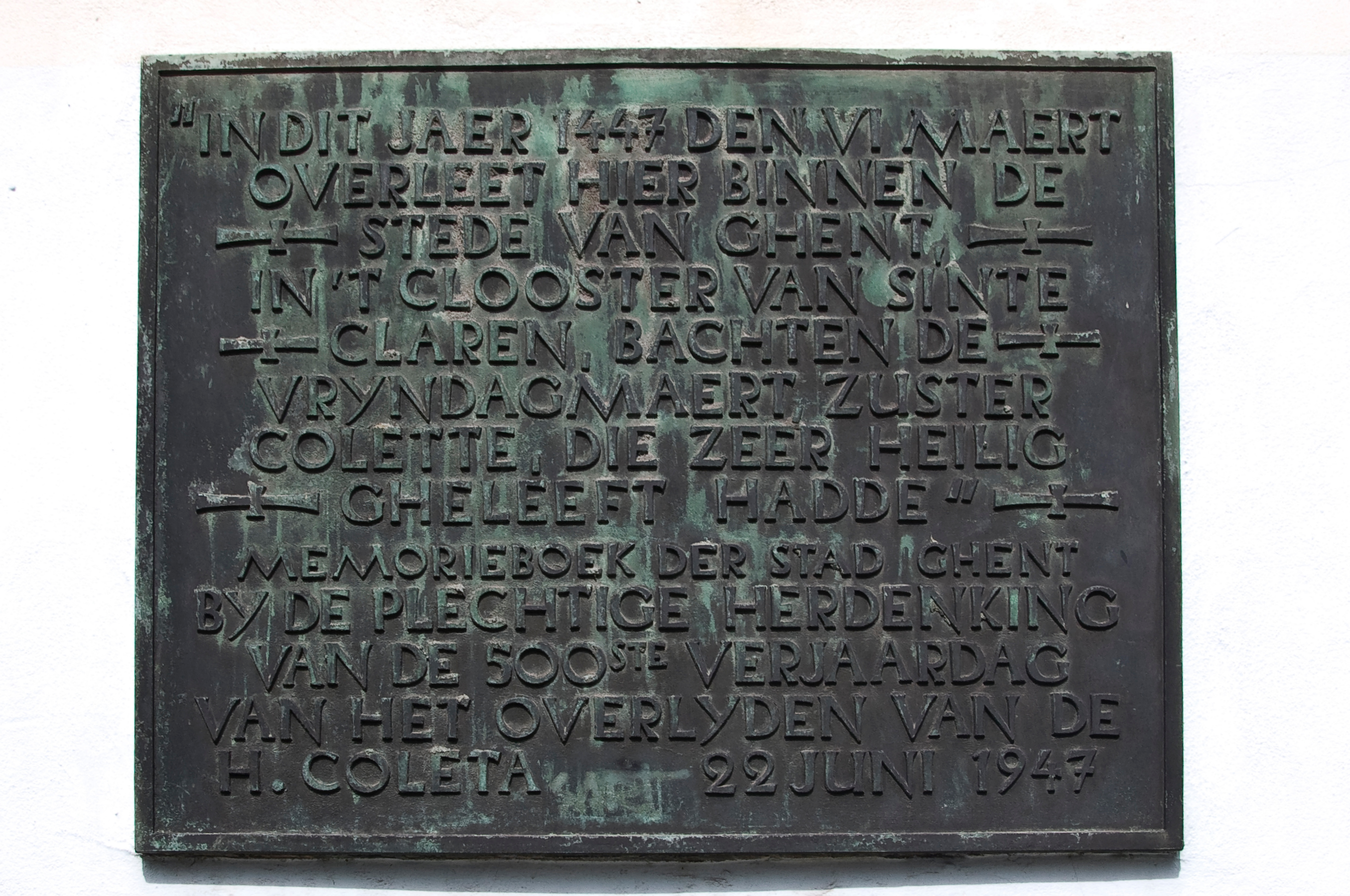 Gedenkplaat aan het pand in de Goudstraat te Gent (België) (vroeger Minnestraat) waar het klooster was gevestigd, gesticht door de heilige Coleta en waar ze overleed in 1447